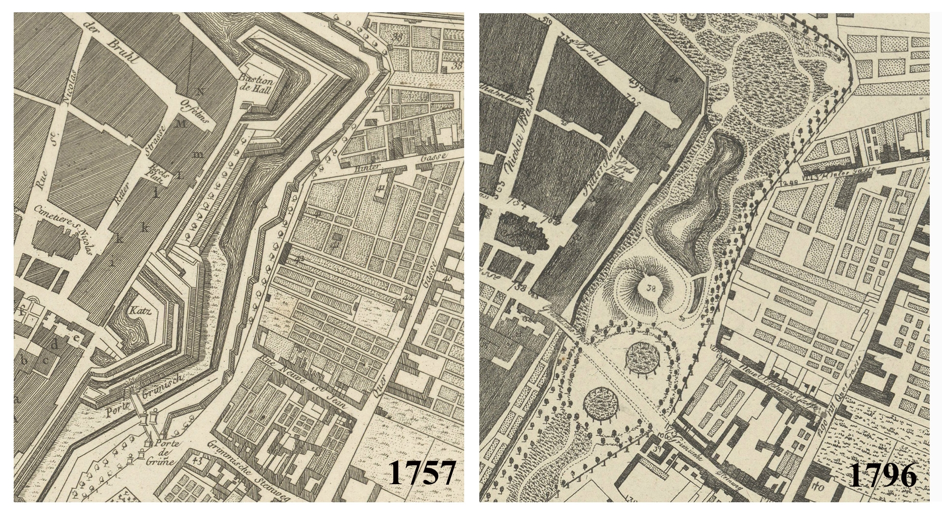 Die Nordostecke von Leipzig auf Kartenausschnitten vor und nach der Beseitigung der Stadtbefestigungsanlagen.